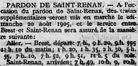 Les trains spéciaux des Chemins de fer départementaux du Finistère en service à l 'occasion du pardon de Saint-Renan le 15 août 1905 ; seule la première moitié de l'article est visible sur ce cliché (journal L'Ouest-Éclair du 15 août 1905).